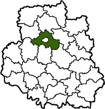 Vinnytskyi-Raion map